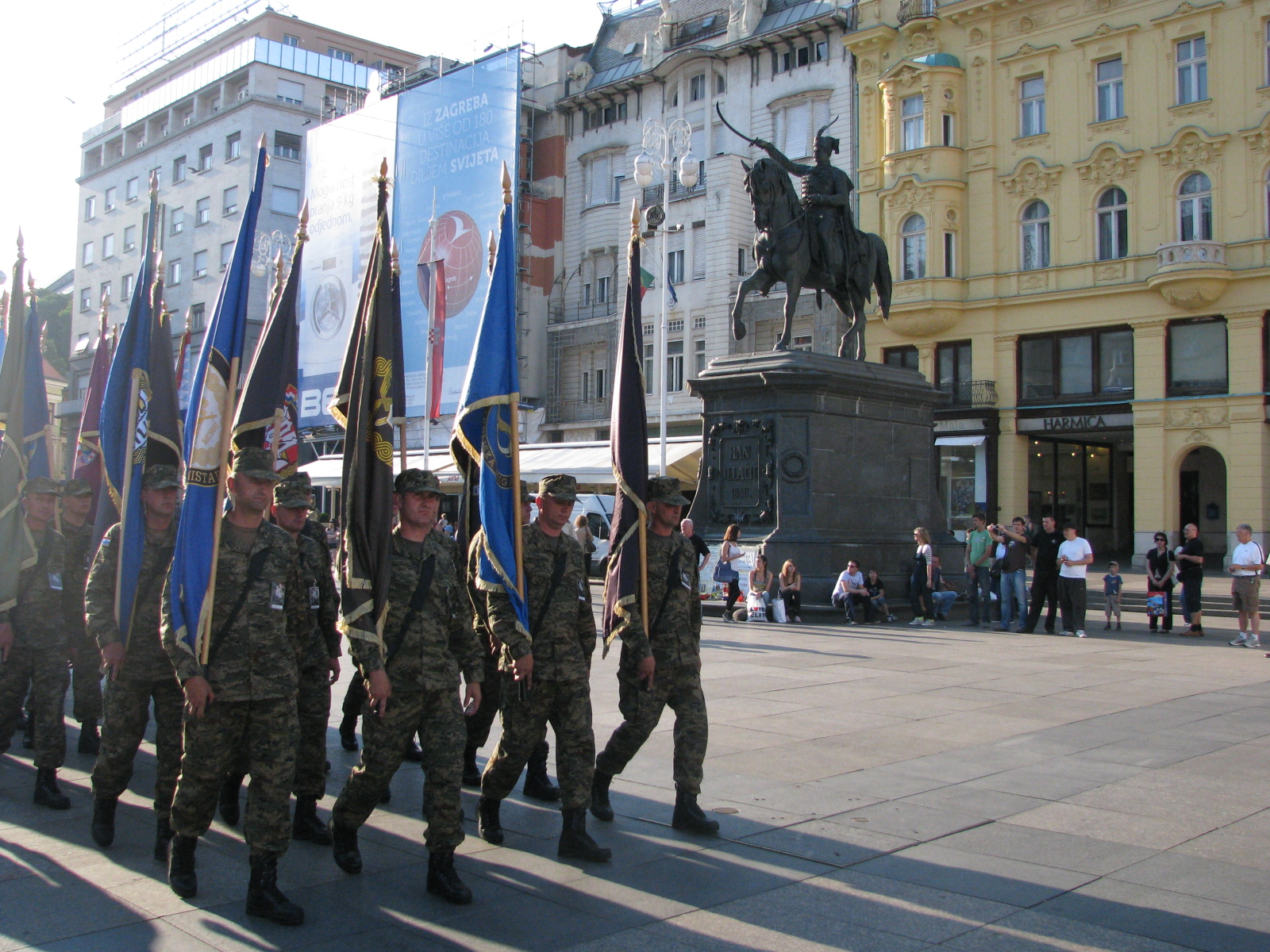 Obilježavanje 20. godišnjice formiranja Oružanih snaga Republike Hrvatske. Mimohod ratnih zastava na Trgu bana Jelačića u Zagrebu 27. svibnja 2011.